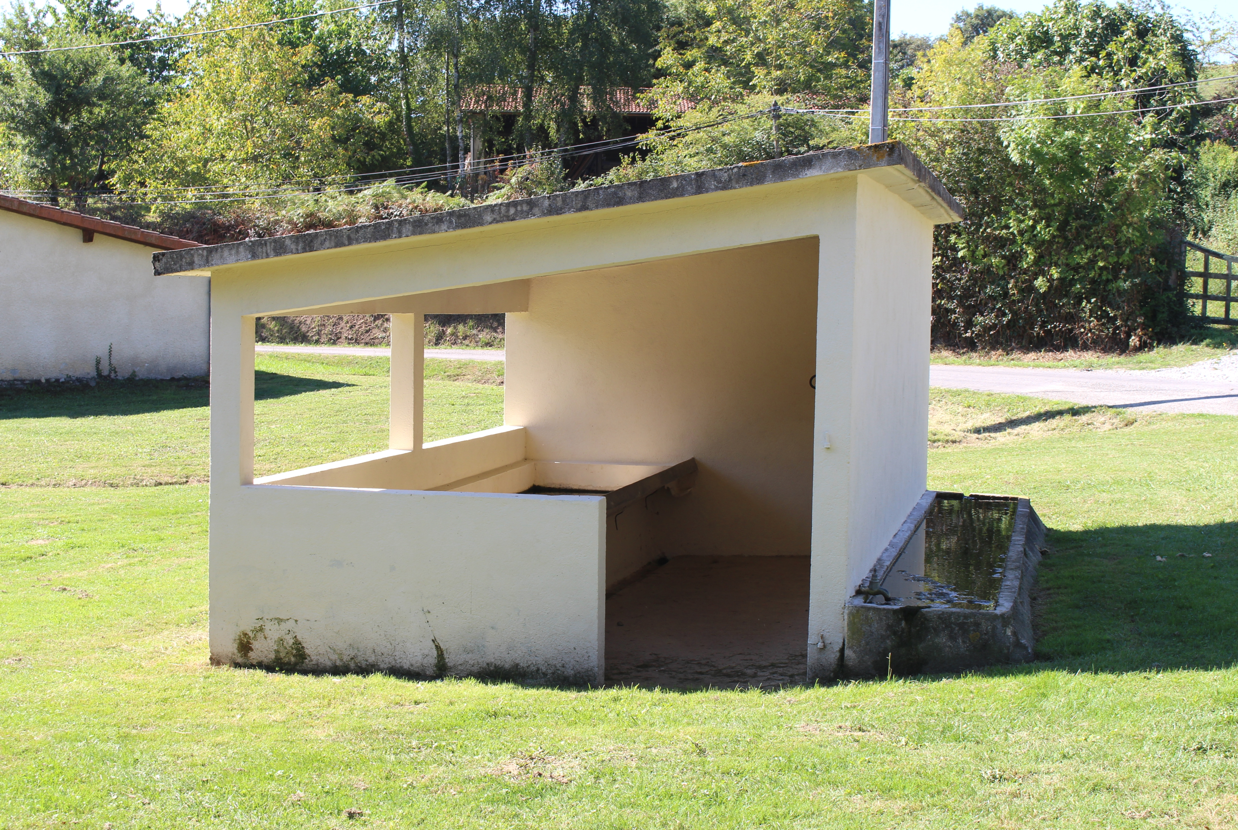 Lavoir de Lescurry (Hautes-Pyrénées)